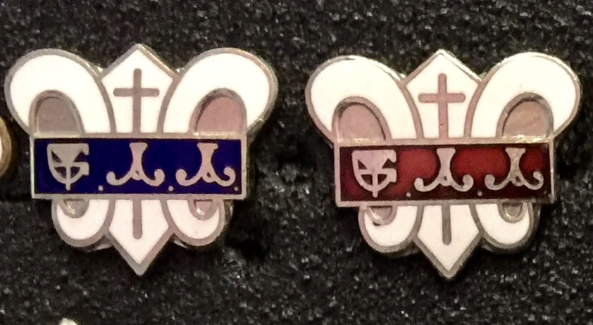 東北學院大学 体育会 ユリの紋章